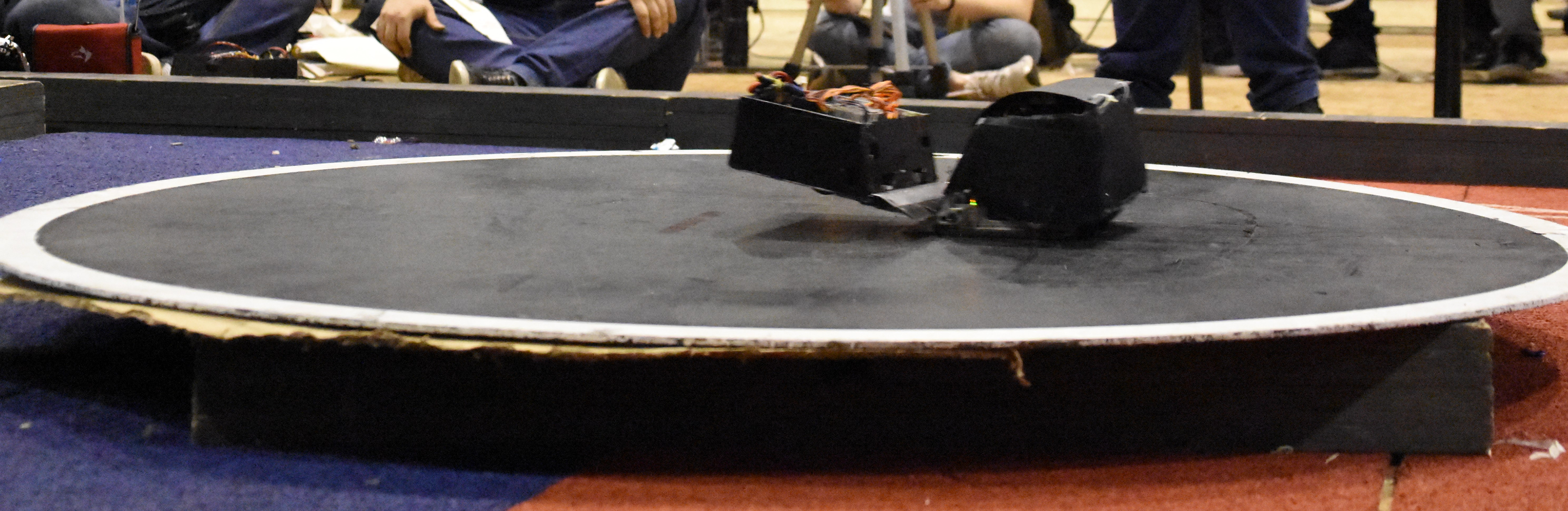 Partida de Sumô 3kg